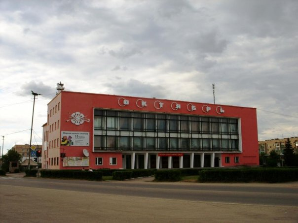 ДК Октябрь, Пласт